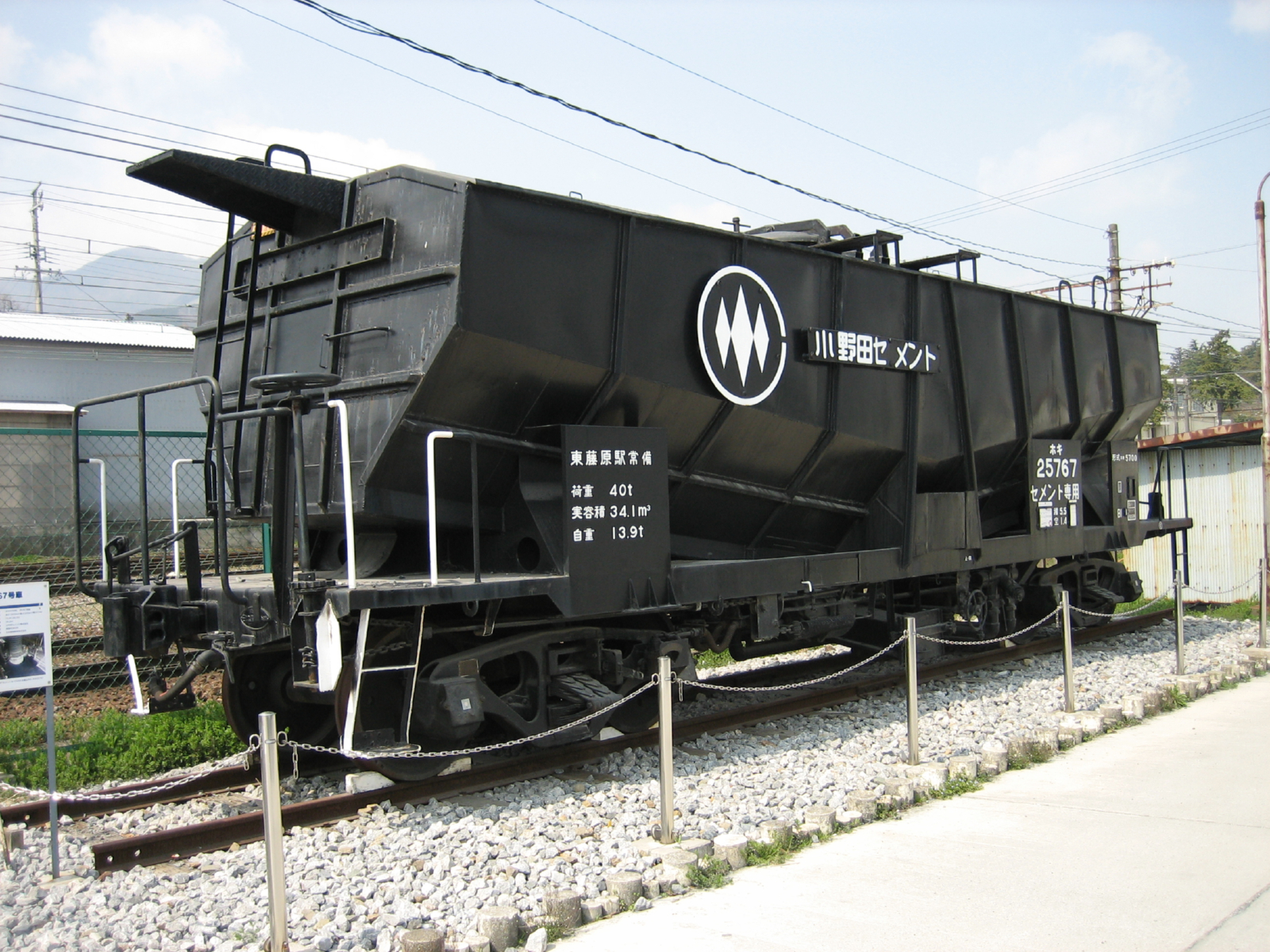 ホキ5700形貨車ホキ25767号。三岐鉄道東藤原駅前にて